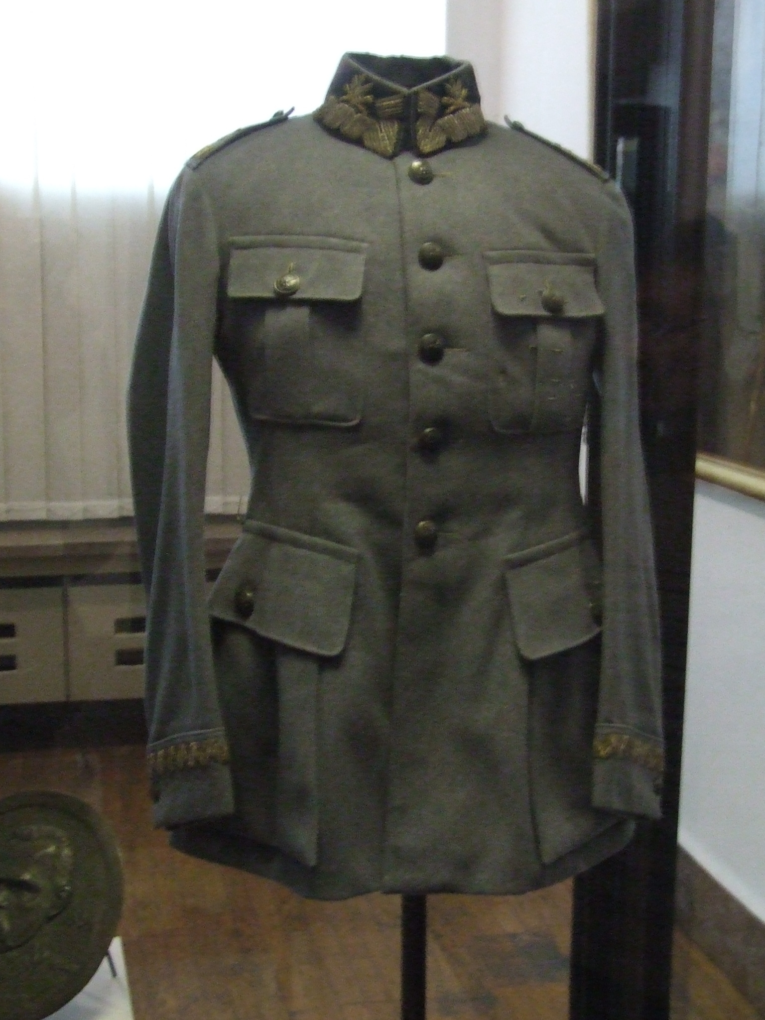 Kurtka po marszałku Józefie Piłsudskim z 1919 r. w Gmachu Głównym Muzeum Narodowego w Krakowie